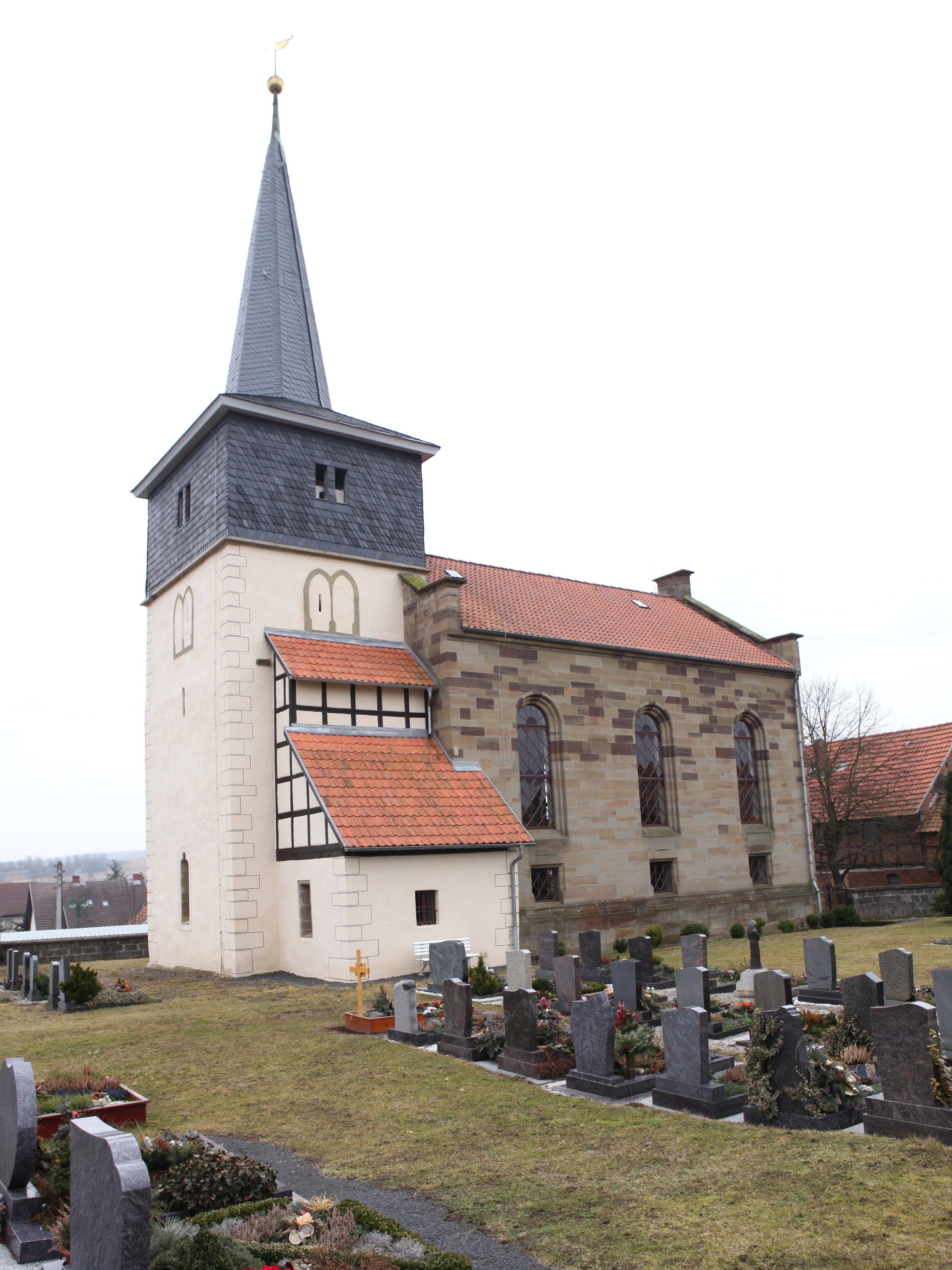 Marienkirche in Simmershausen